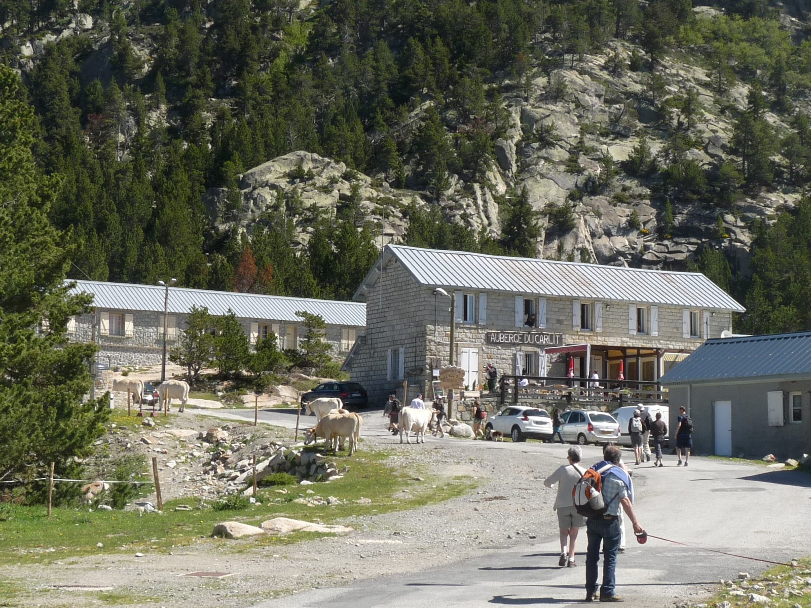 Auberge du Carlit près du lac des Bouillouses, commune des Angles, P.O., France